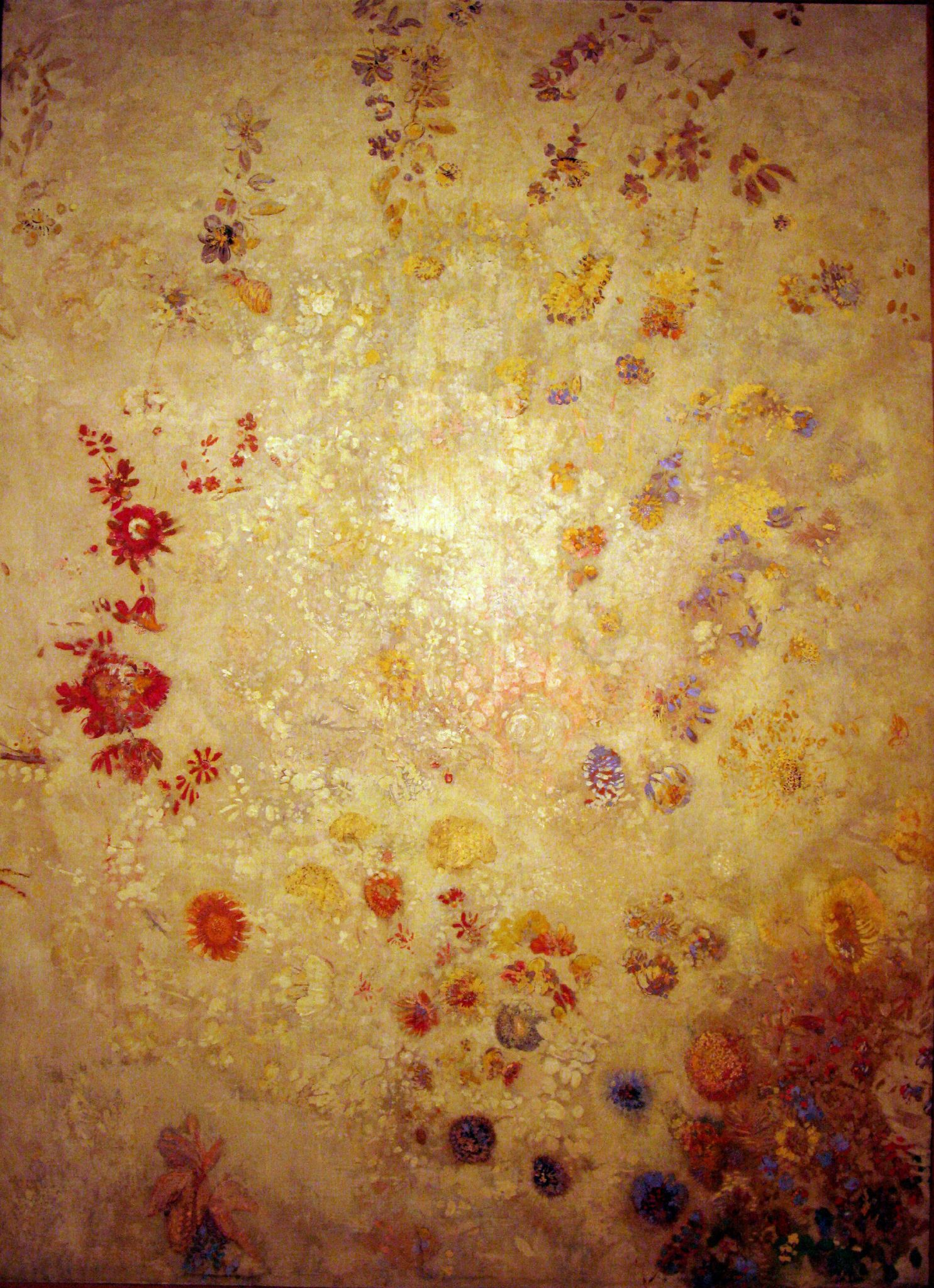 Odilon Redon, Panneau décoratif, 0729 Panneau Décoratif, Odilon Redon, 1902